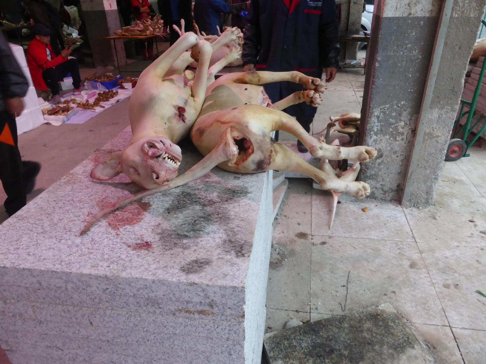 腸から肛門まで処理された犬